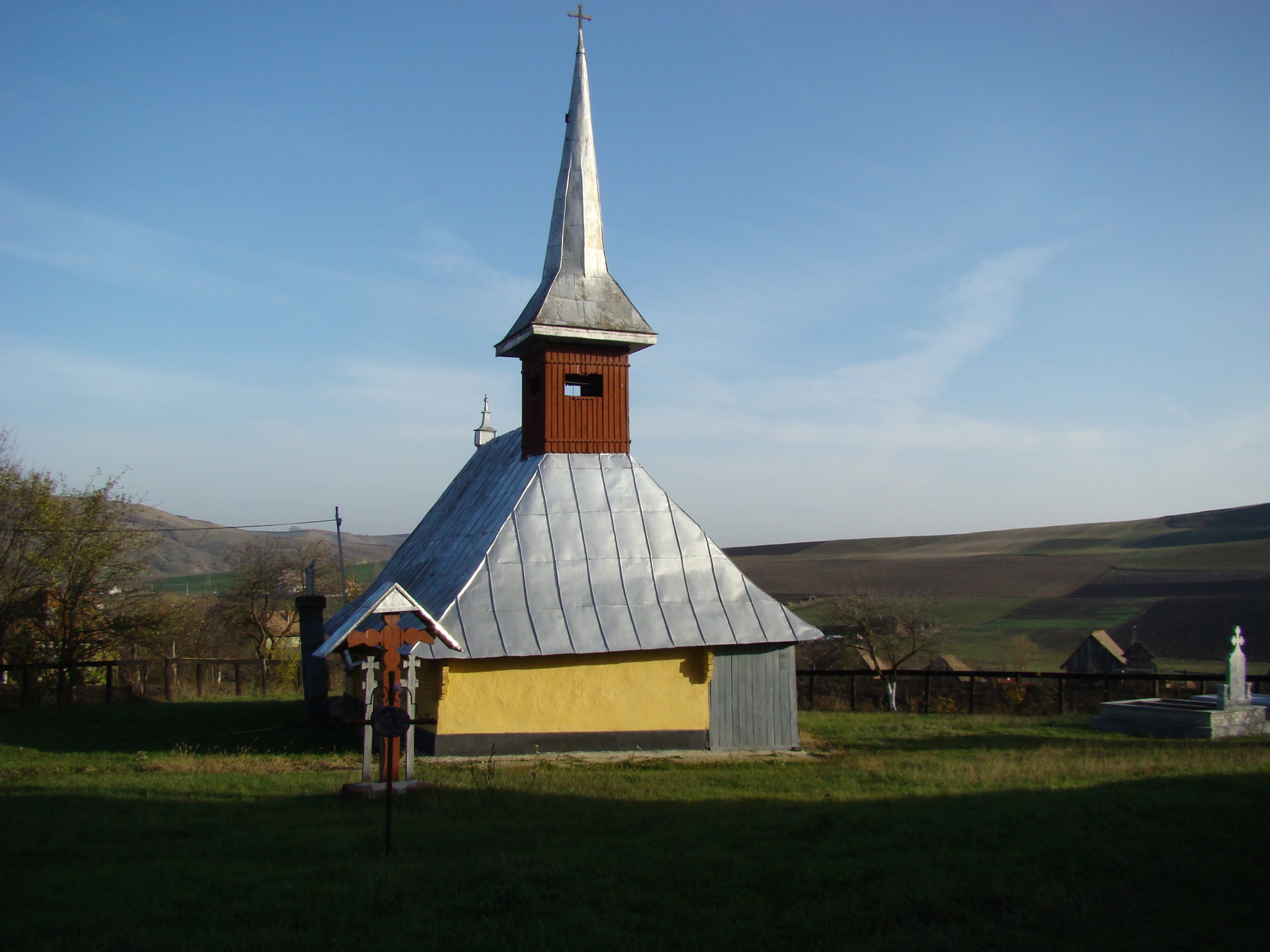 Biserica de lemn "Sf. Arhangheli Mihail şi Gavriil" , sat BERCHIEŞU; comuna FRATA